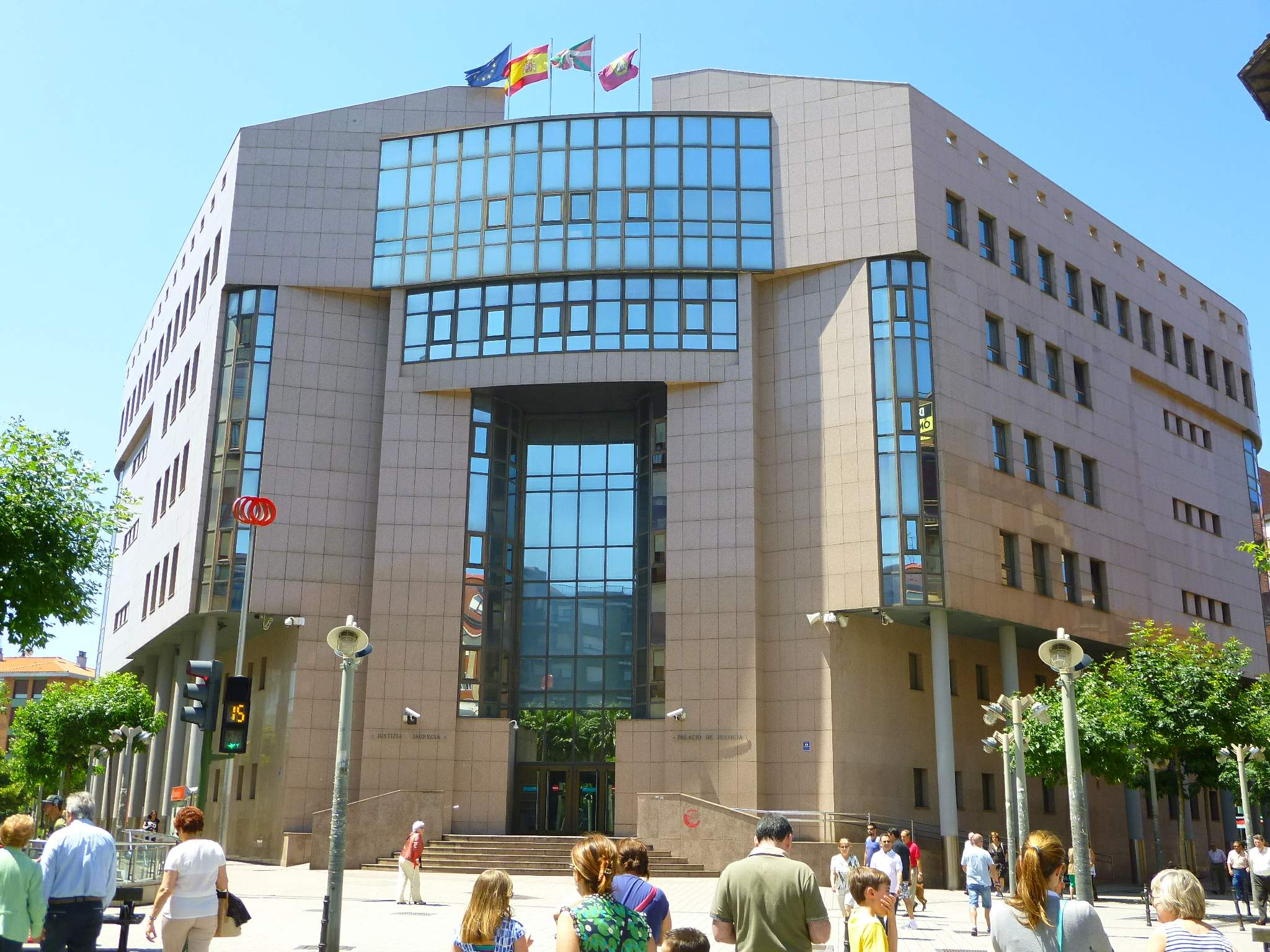 Palacio de Justicia (Barakaldo, Bizkaia)